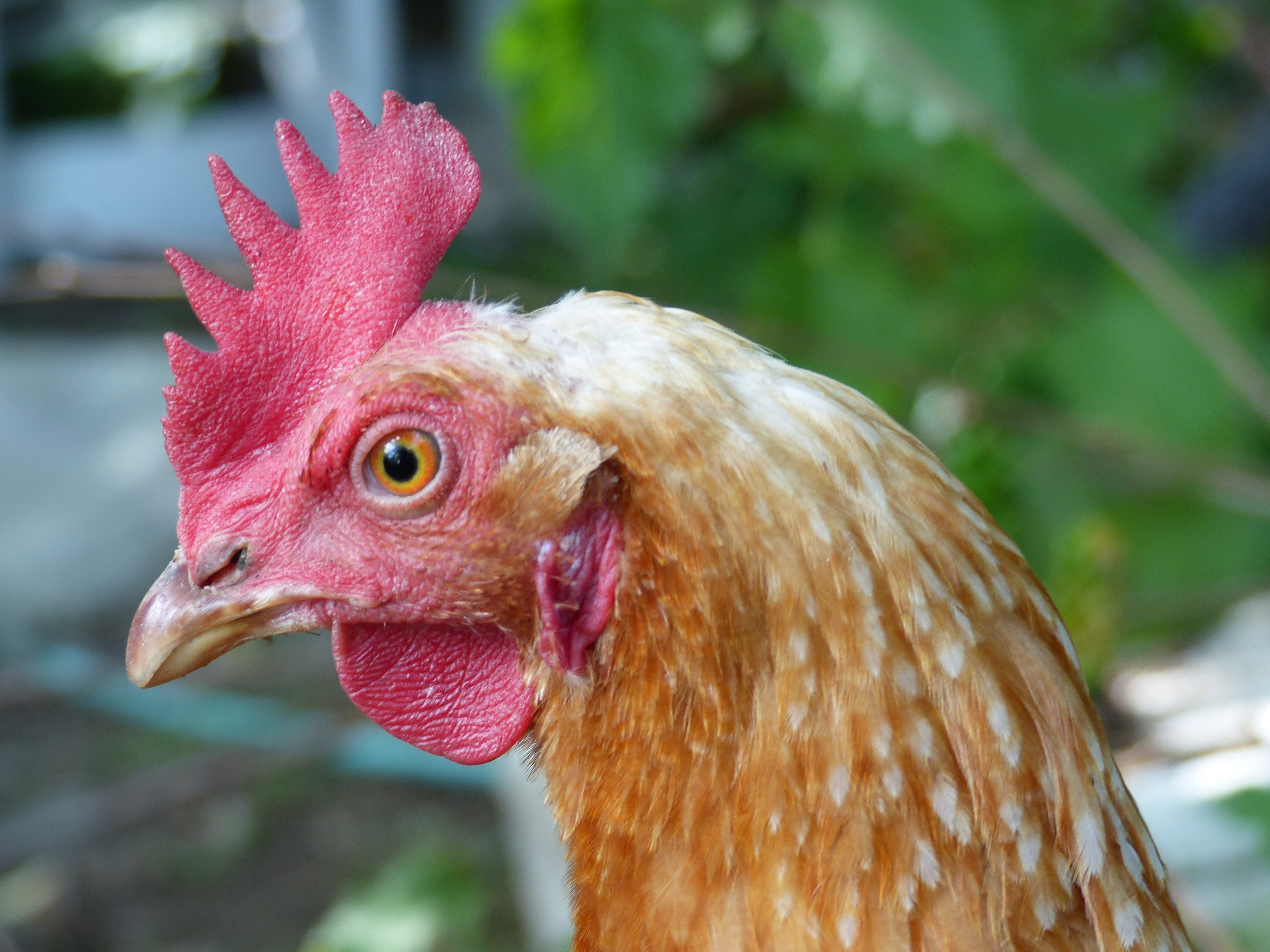 Poule pondeuse de souche industrielle, provenant du lycée agricole Le Gros Chêne à Pontivy. Comme chez toutes les souches de pondeuses industrielles, le bec a été épointé.